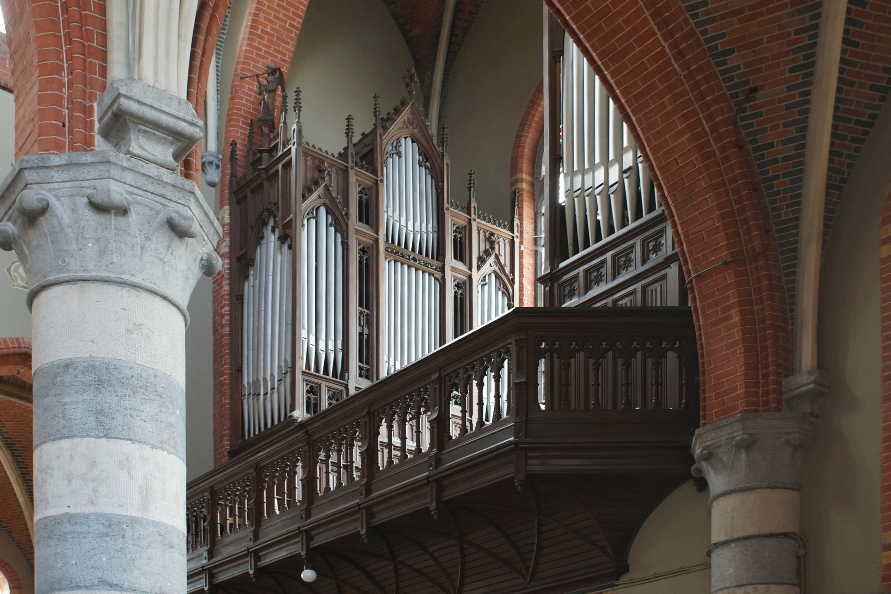 Vereecken-orgel in de kerk van Onze-Lieve-Vrouw van Bijstand (Aalst)